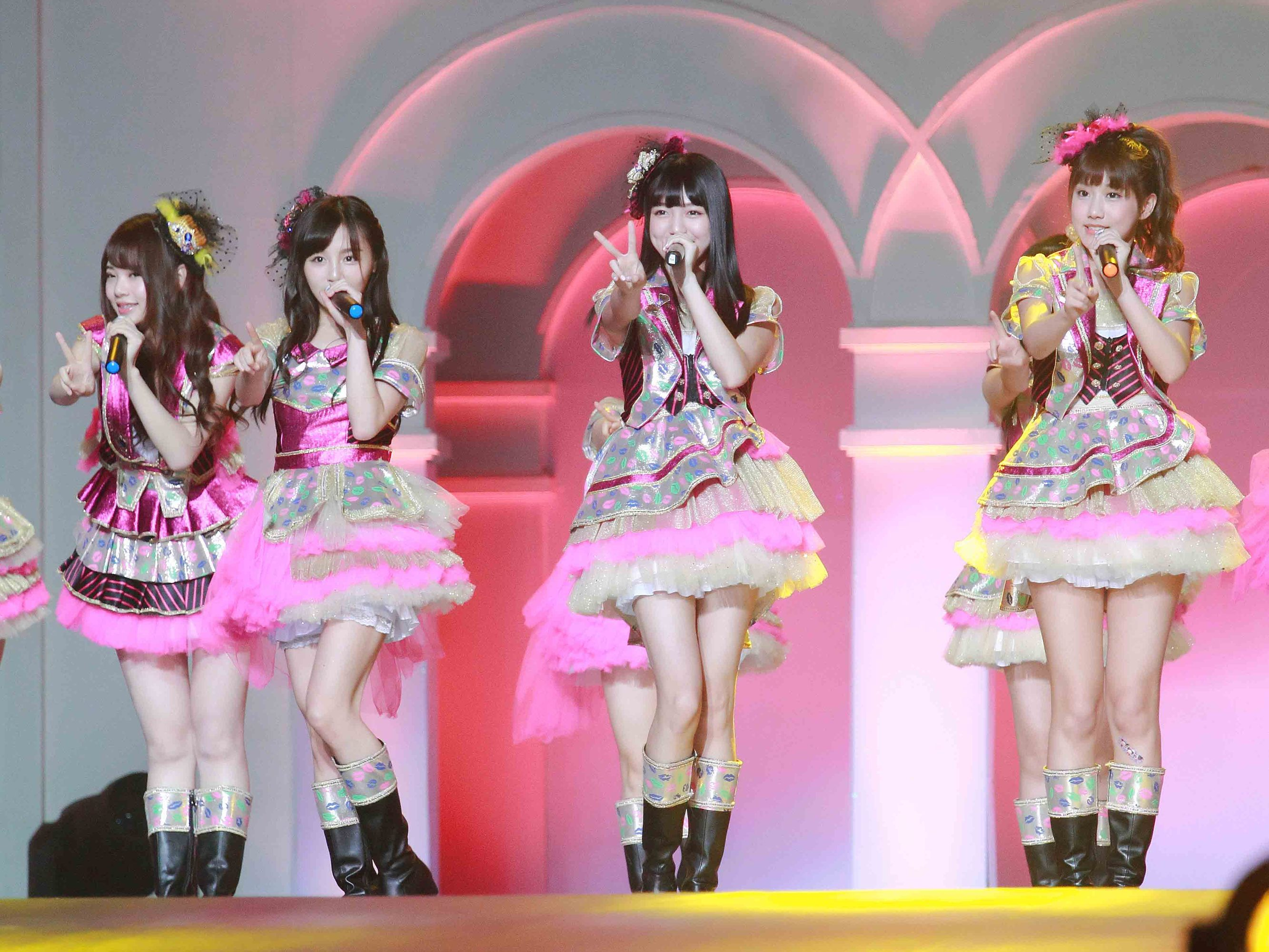 SNH48 第二届总选举